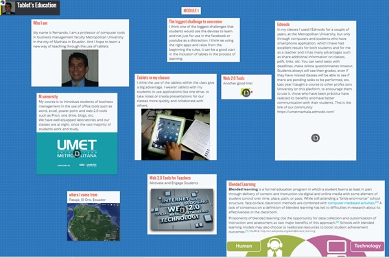 ePortafolio, portafolio digital para el seguimiento de las clases, usando padlet